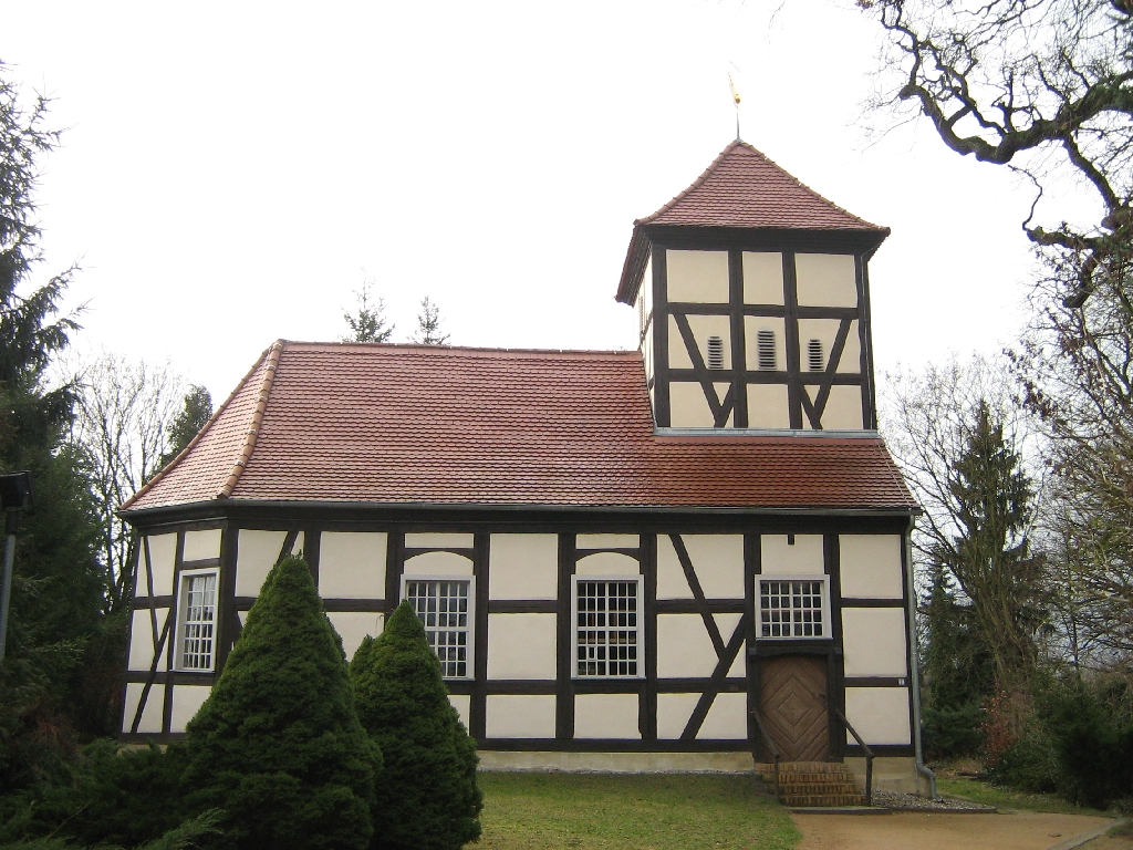 Die Fischerkirche in Ferch (Gemeinde Schwielowsee, Landkreis Potsdam-Mittelmark, Brandenburg).)